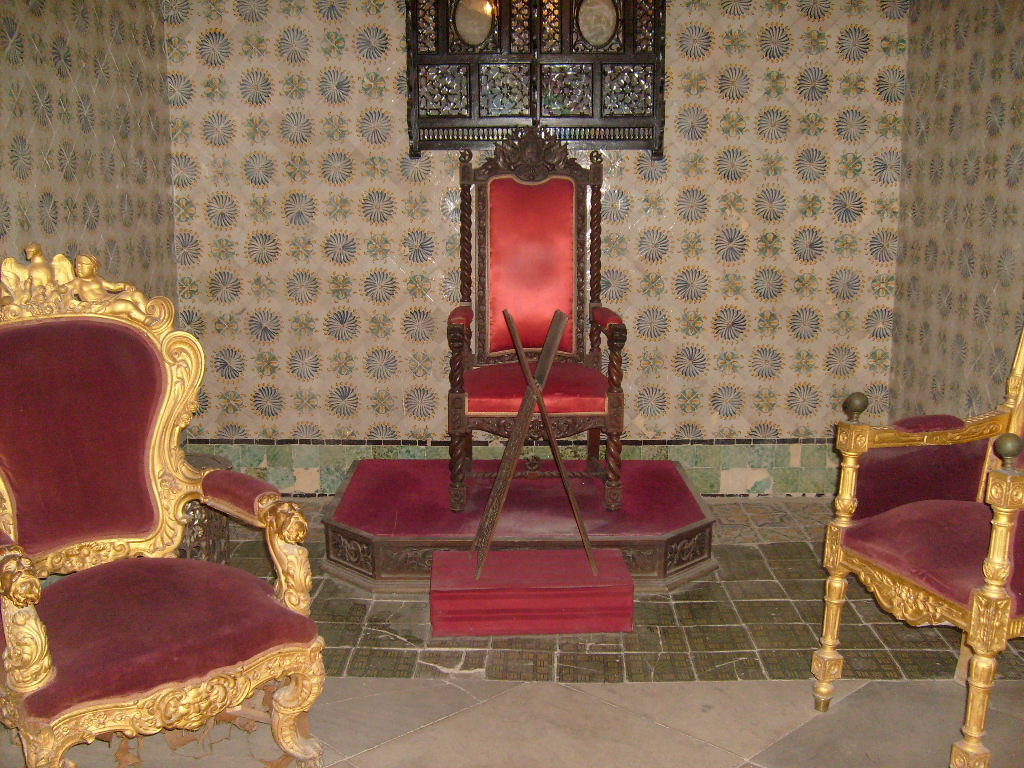 Trône du bey de Tunis exposé au Musée national du Bardo (Tunisie)